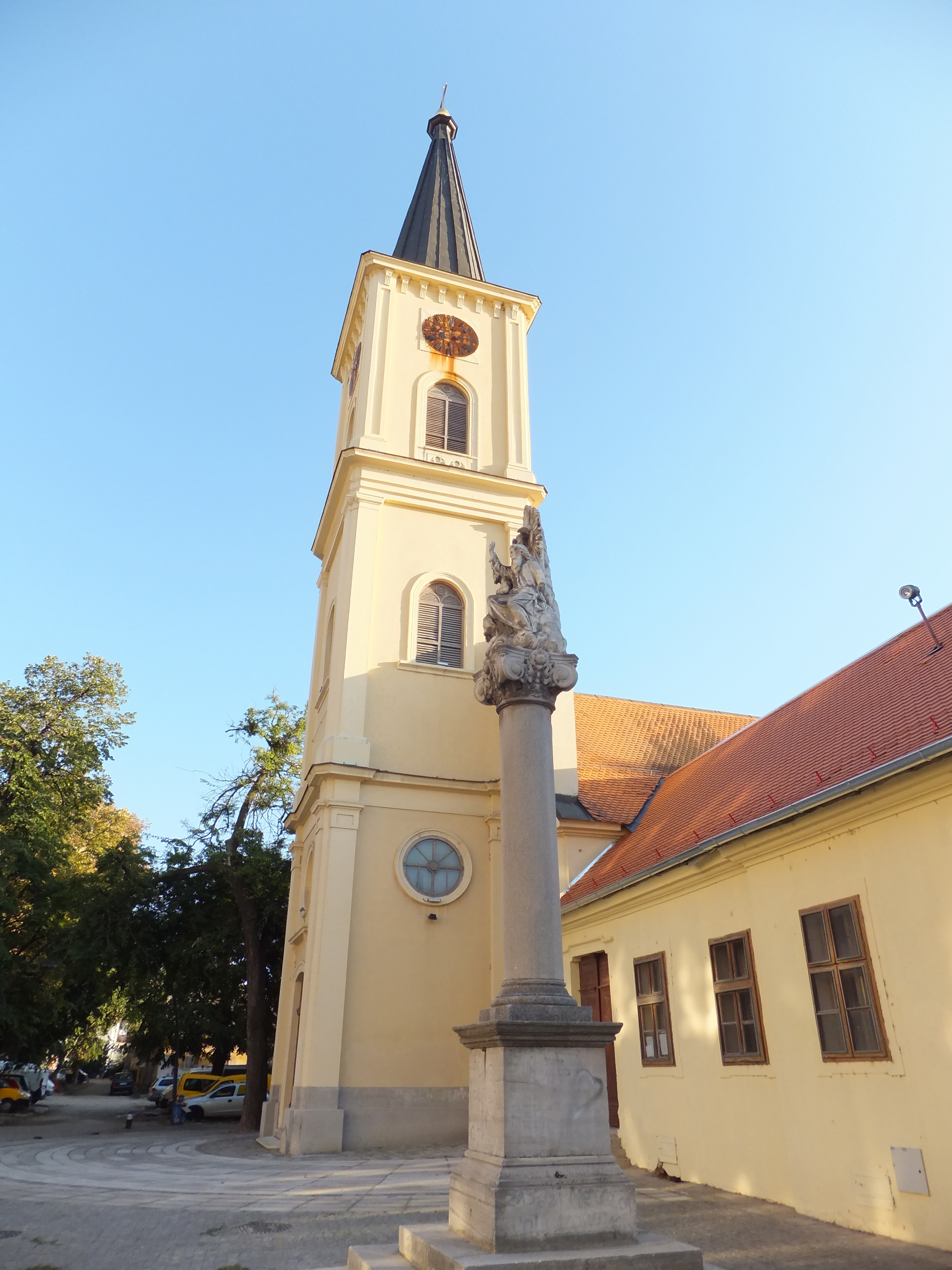 Старо градско језгро Панчева; Римокатоличка црква